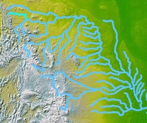 Marías River